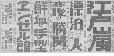 北海タイムス、1927年（昭和2年）4月22日、第2面の一部、エンゼル館広告 Unknown